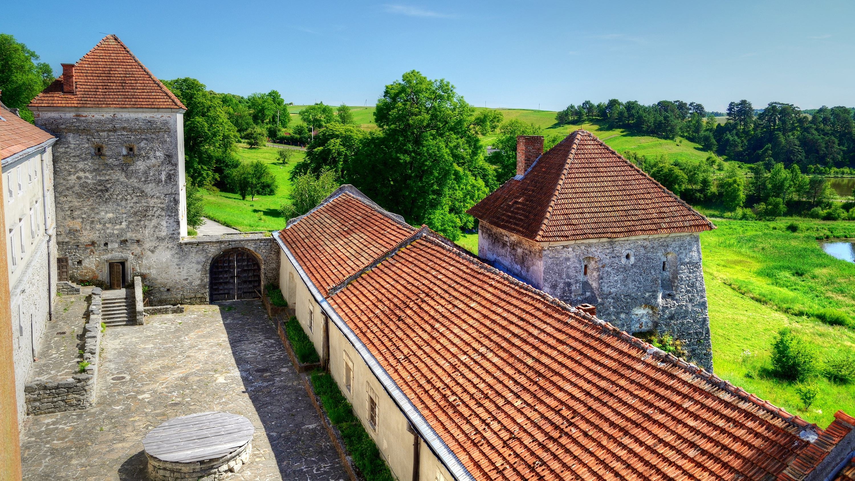 Свірж нижній двір замку